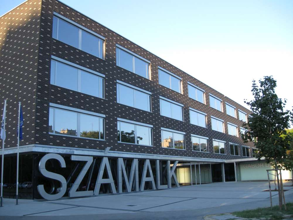 Gábor Dénes Főiskola (Budapest, XI., ker., Mérnök u. 39.)